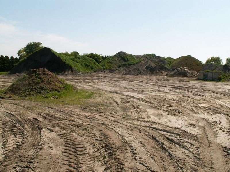 Kamp Borgermoor